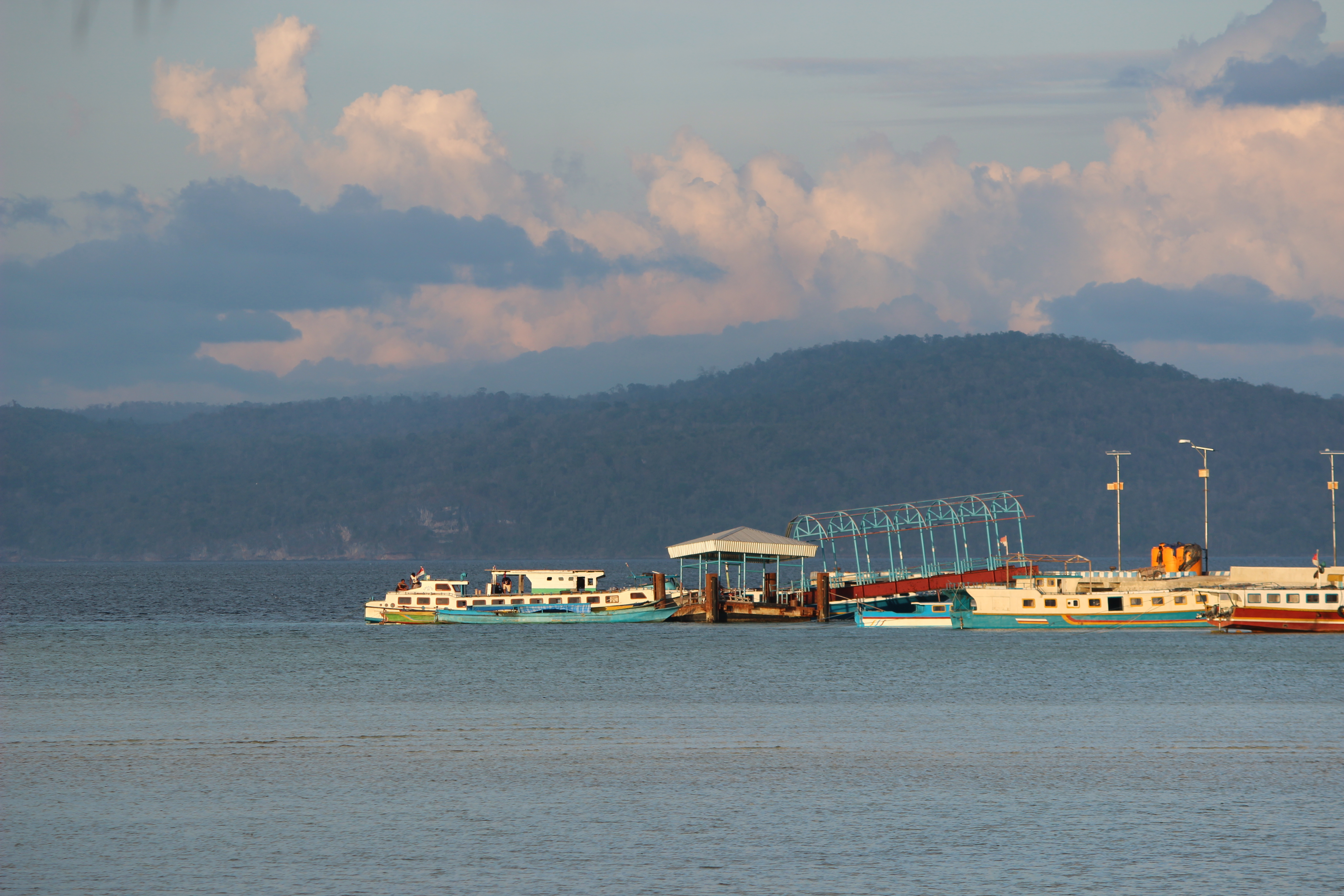 PELABUHAN SIOMPU